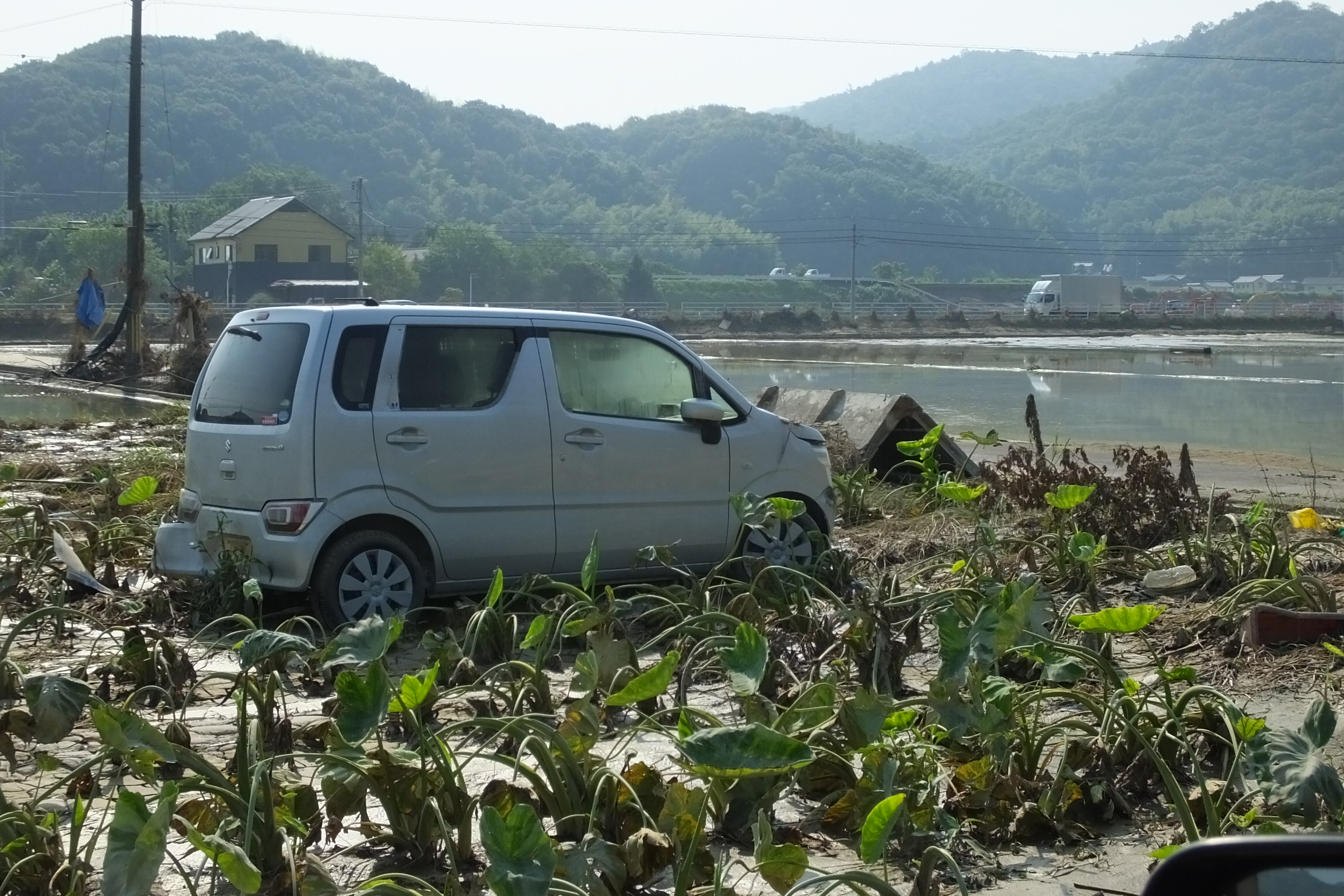 2018-07-14 Floods of Mabi, Kurashiki City 倉敷市真備 平成30年7月豪雨被害